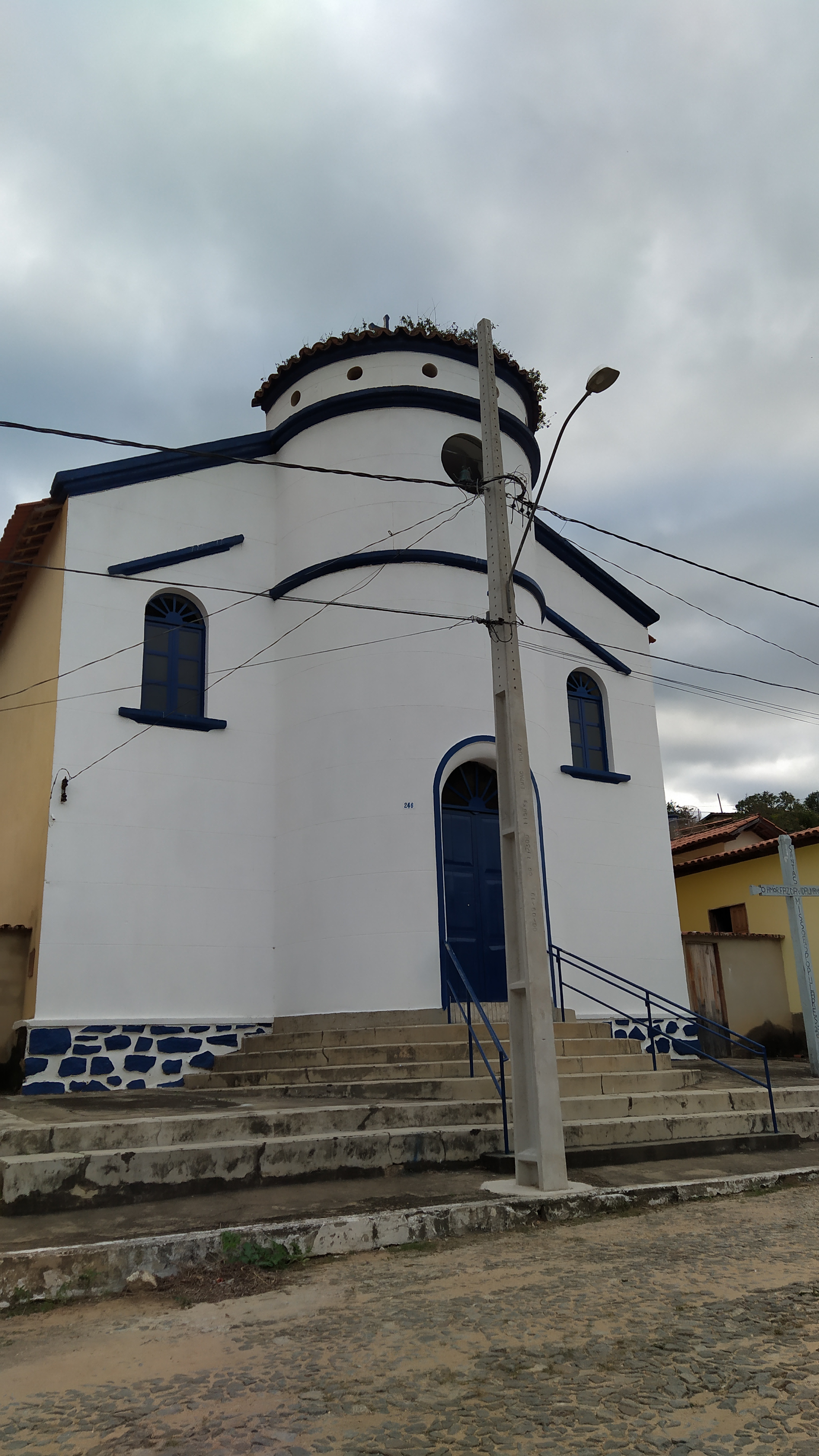 Capela Nossa Senhora das Graças em Itapiru-MG